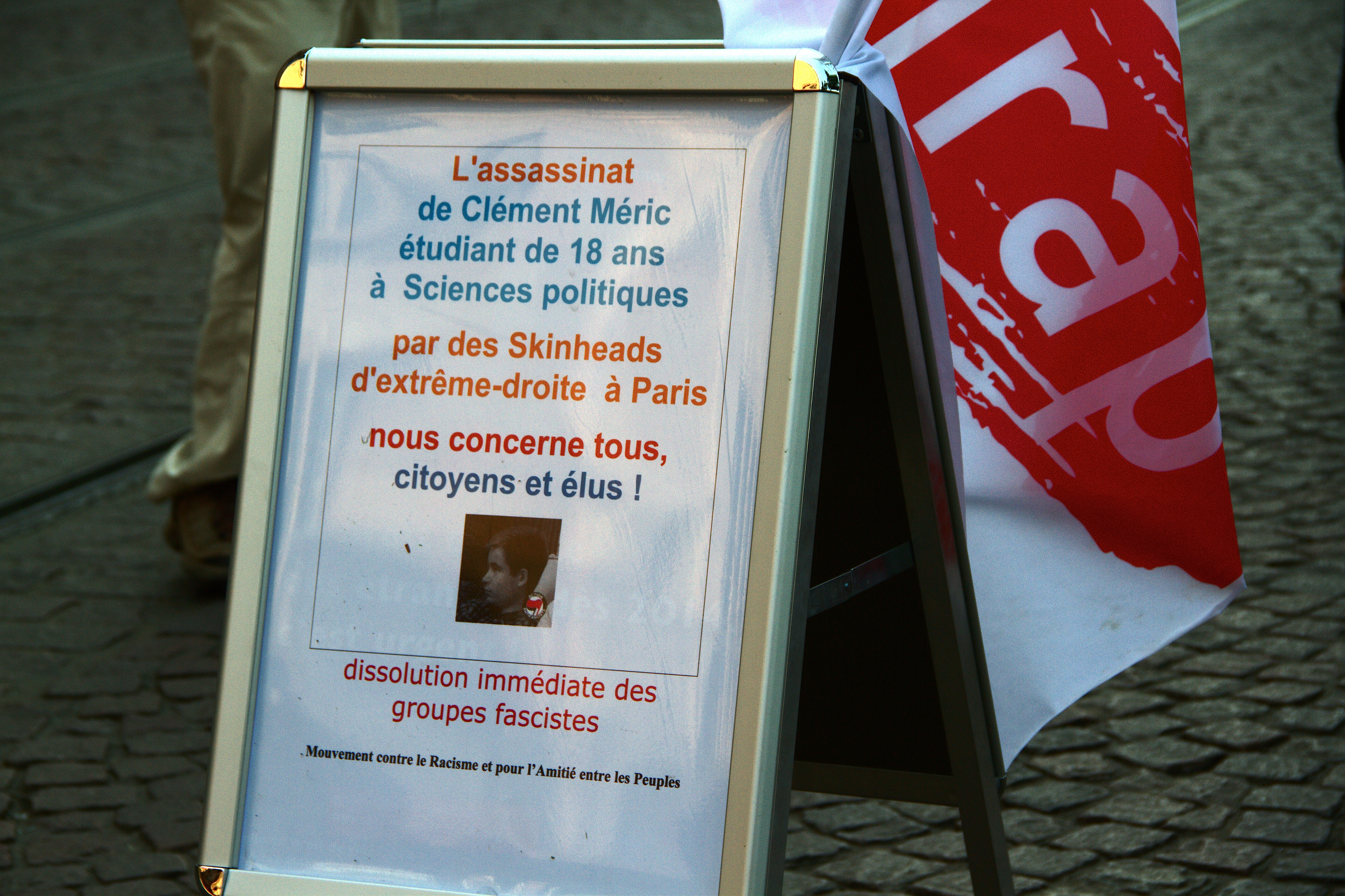 Strasbourg 6 juin 2013. Pancarte du Mouvement contre le racisme et pour l'amitié entre les peuples en mémoire Clément Méric.